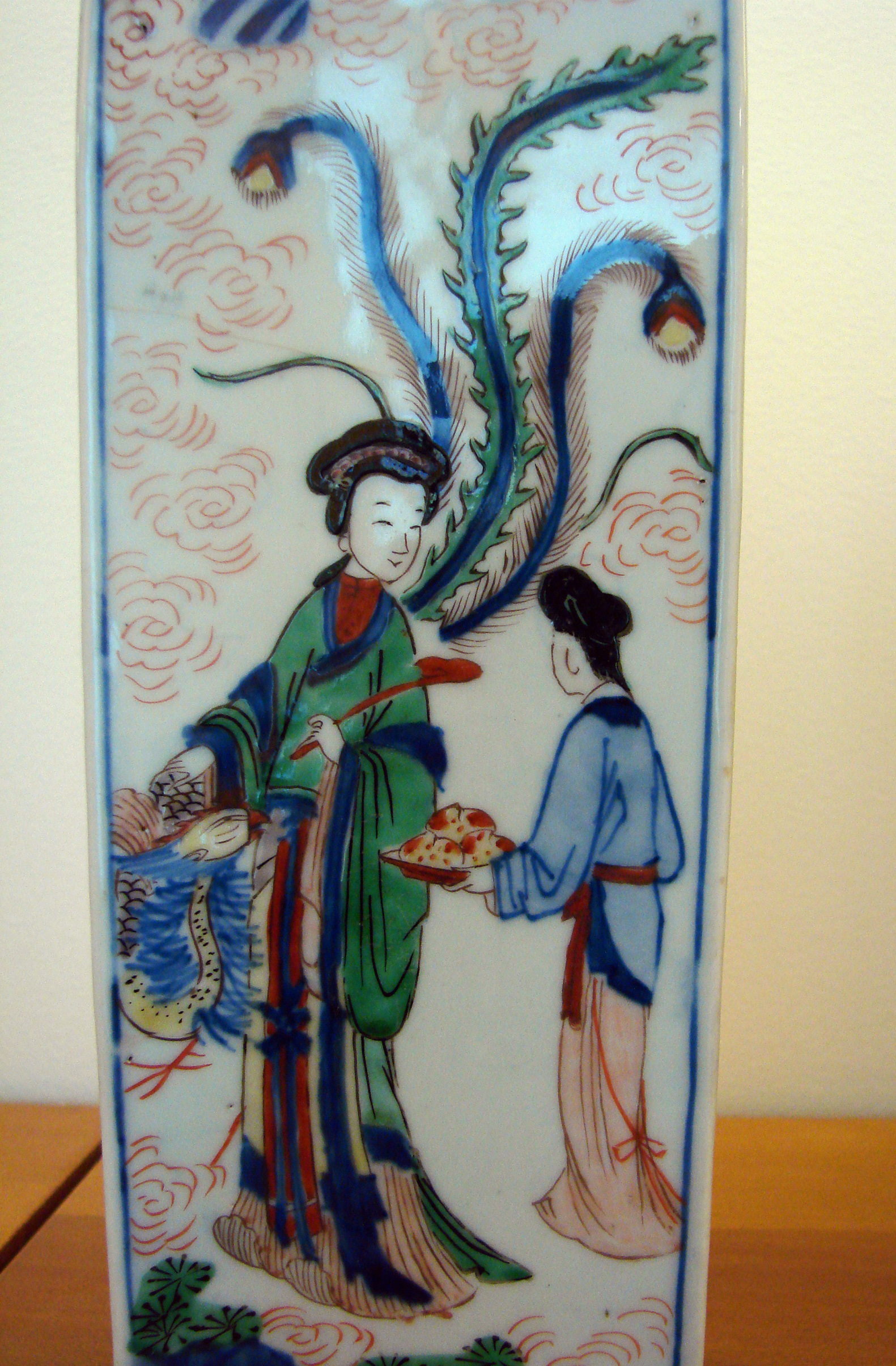 Vase quadrangulire à décor de personnages, dynastie Qing, période Kangxi (1662-1722). Musée Guimet, Paris.